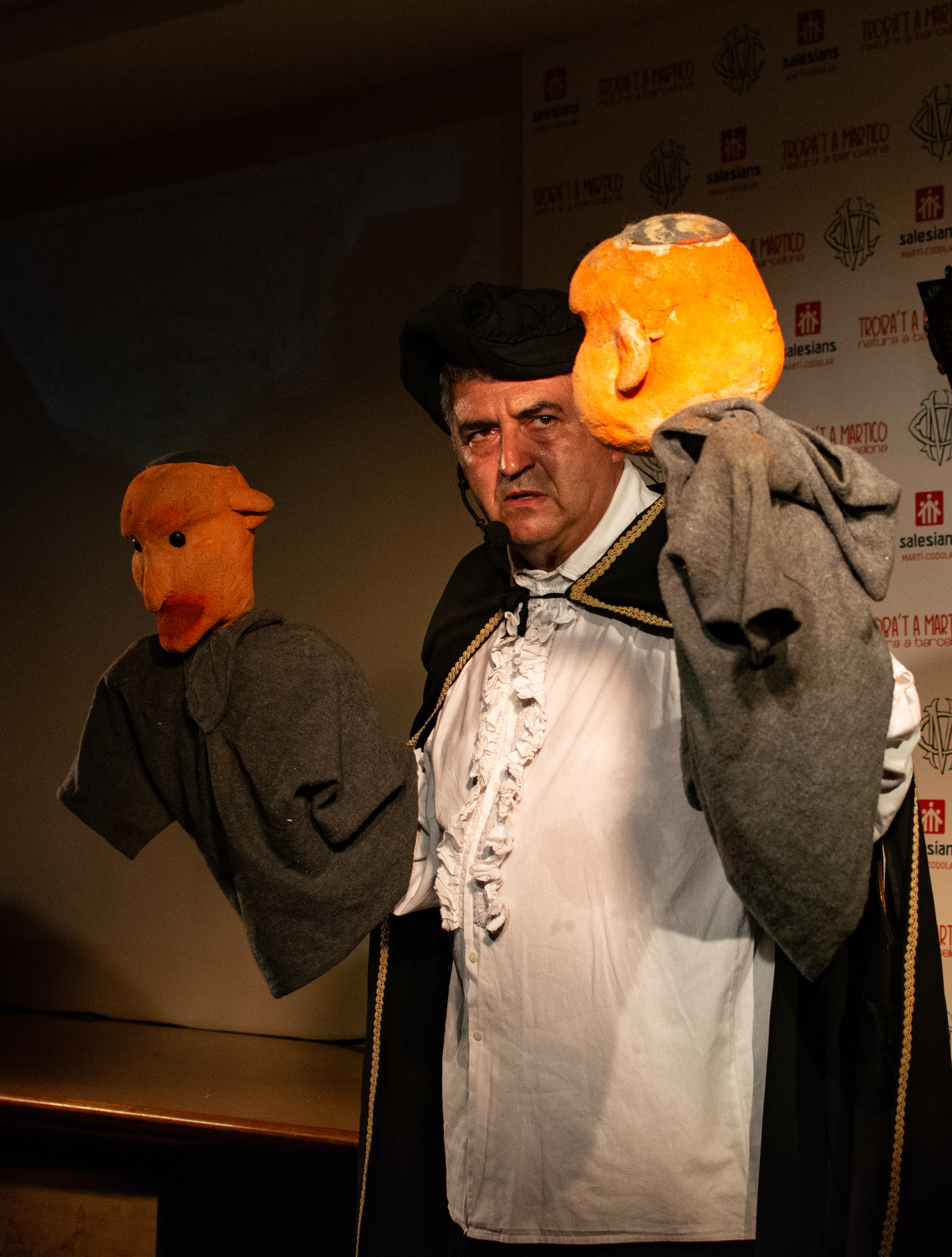 Spektaklo de Saŝa Pilipović dum la SAT-Kongreso 2019